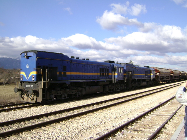 HŽ serija 2062 na kolodvoru Lovinac na Ličkoj pruzi